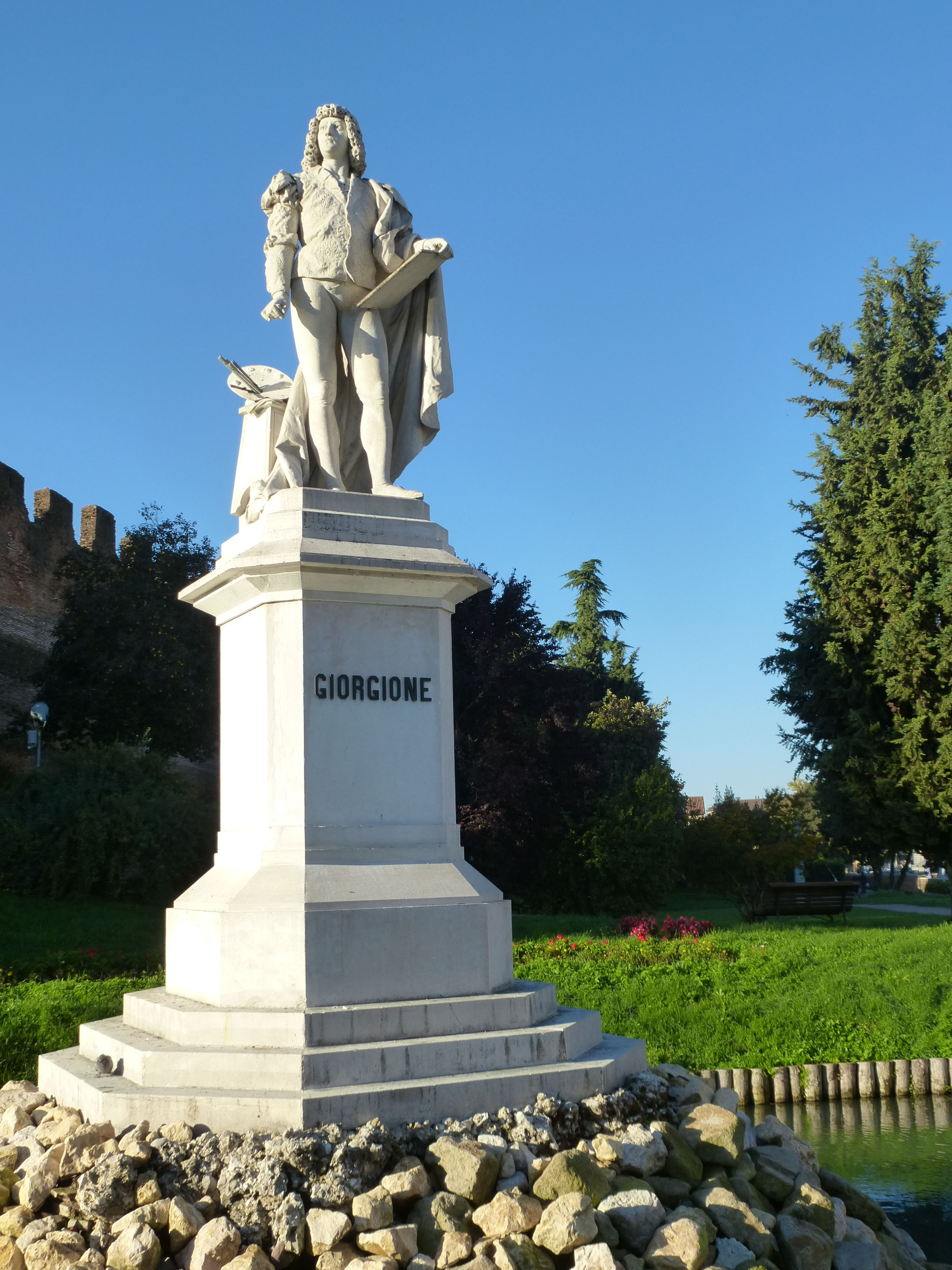 Denkmal des Malers Giorgione in Castelfranco Veneto, errichtet 1878